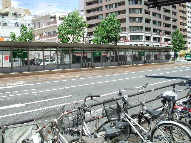 広島電鉄十日市町電停紙屋町方面ホーム。